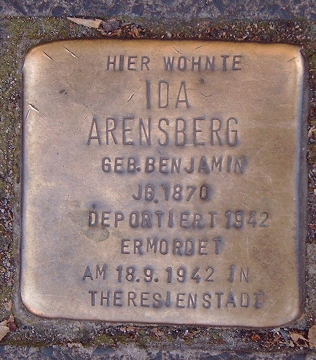 Stolperstein für Ida Arensberg geb. Benjamin Jg. 1870 deportiert 1942 (siehe Gedenkbuch des Bundesarchivs [1]), Kölnstraße 93, Bonn-Nordstadt